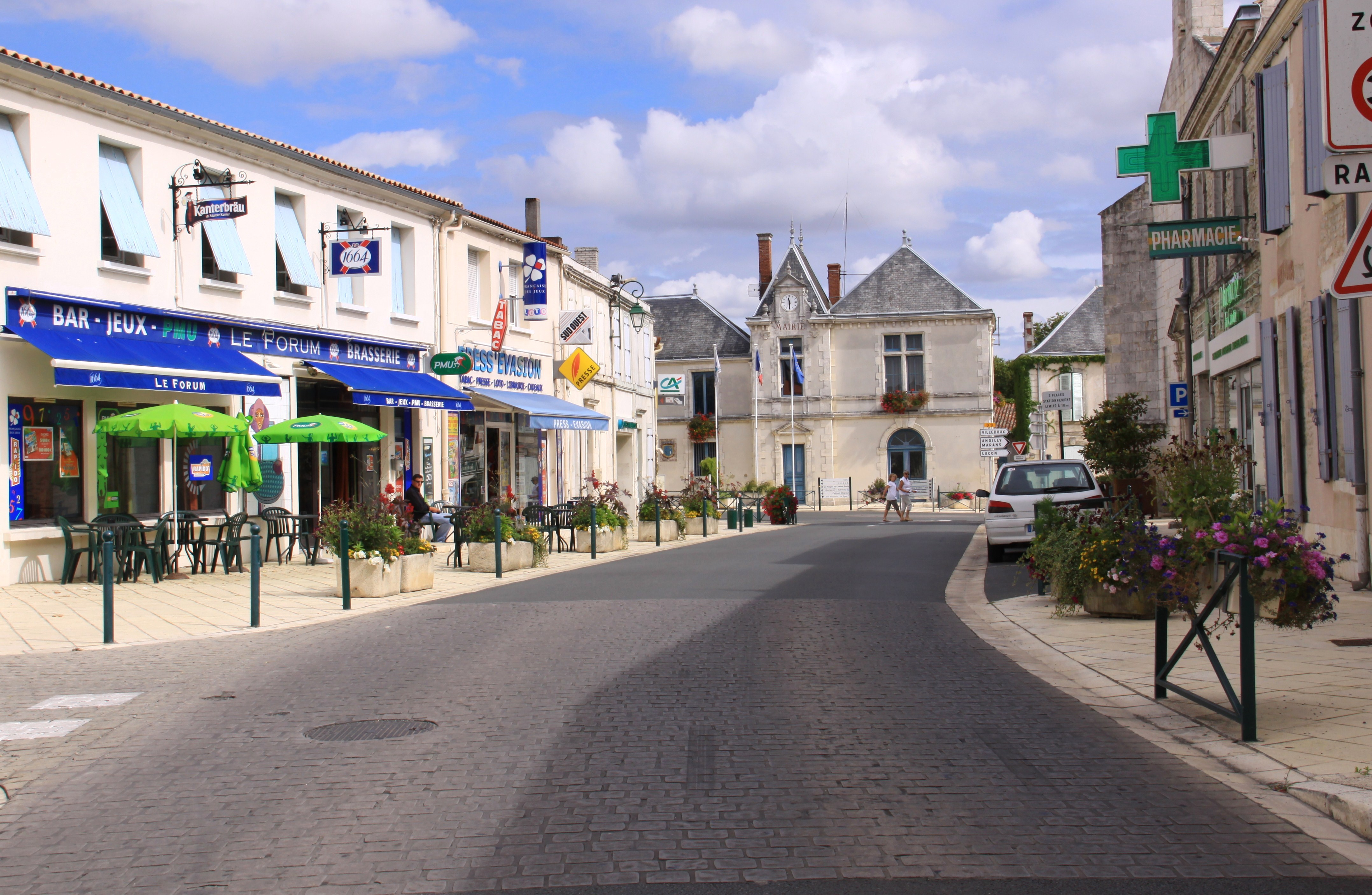 La rue de la République, le centre de l' agglomération et en arrière plan la mairie. Saint-Xandre (Communauté d' Agglomération de La Rochelle), Charente Maritime, France.